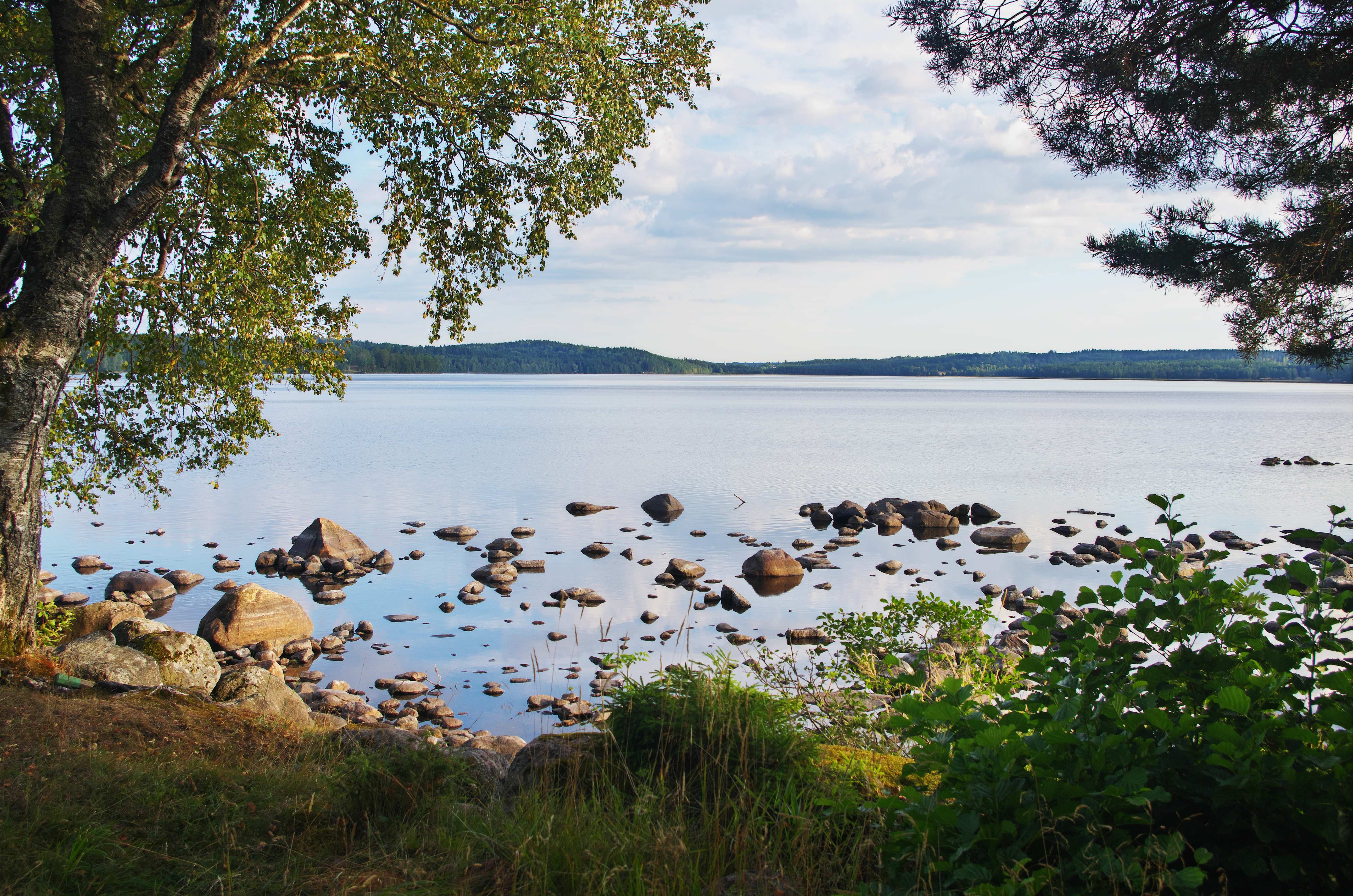 Jogen en sjö i Ulricehamns kommun.